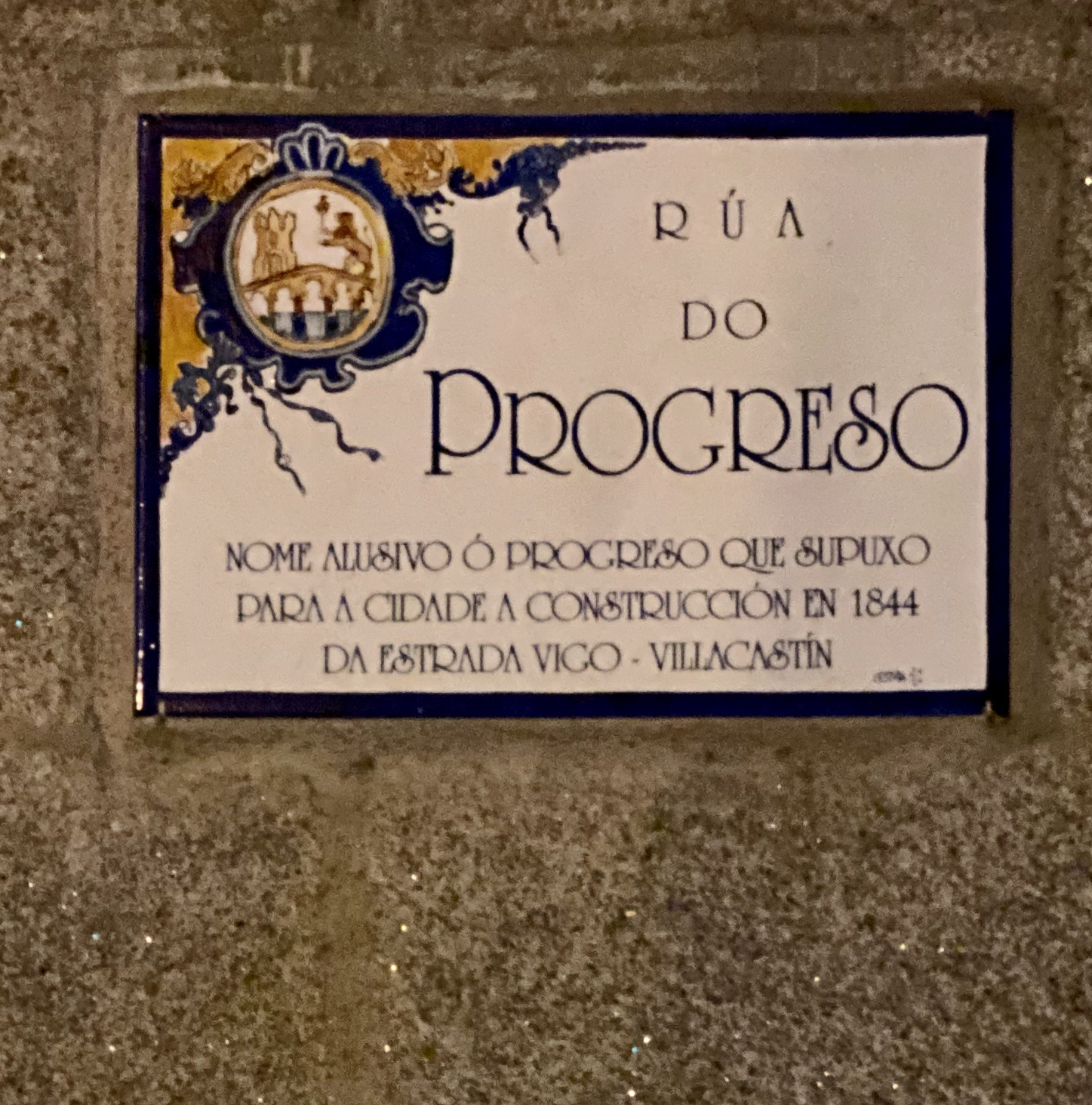 Cartelón-homenaje a la carretera Villacastín-Vigo en la calle del Progreso en Orense.